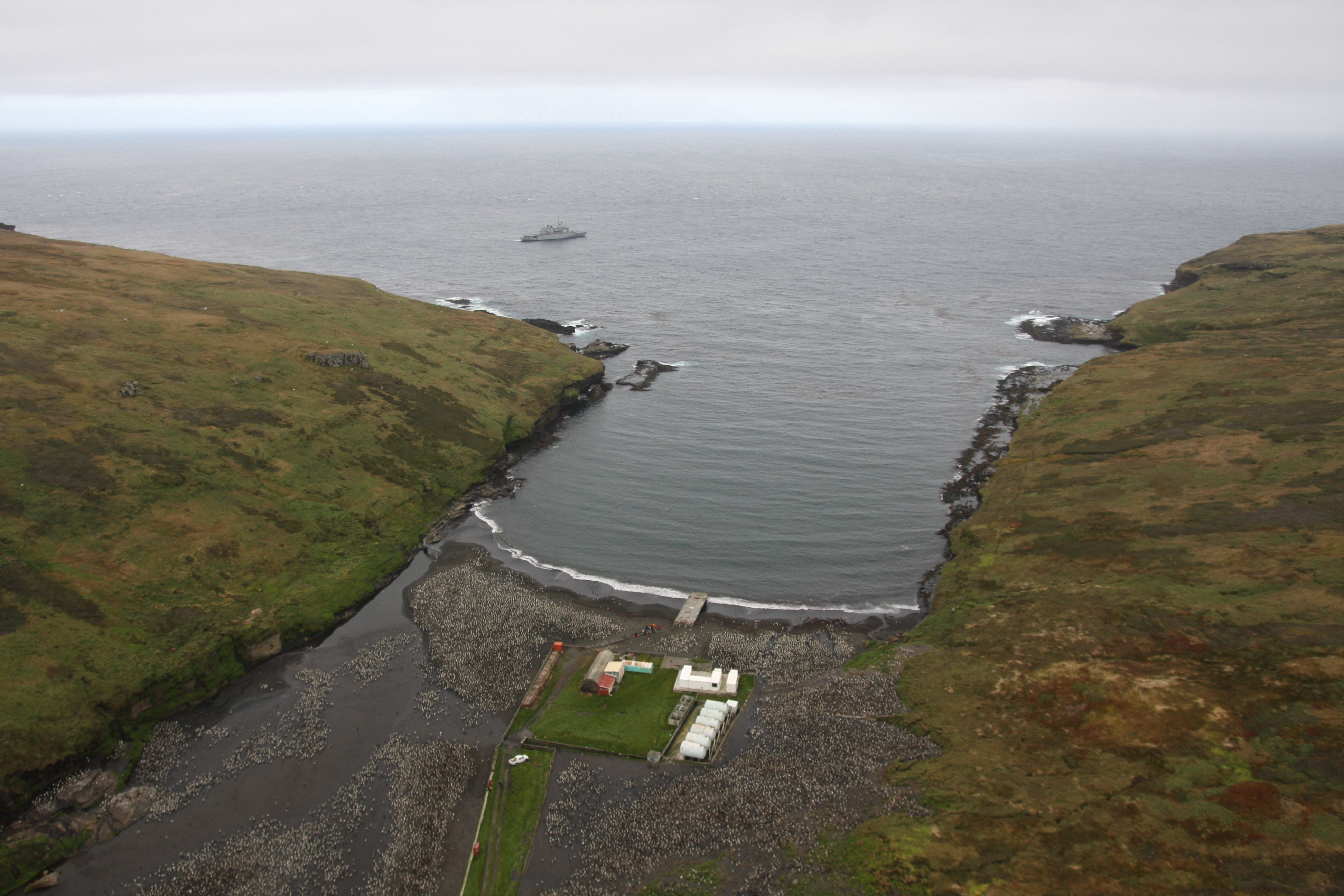 Vue aérienne de la crique du Navire et de la baie du Marin où un bateau militaire est au mouillage. Au premier plan, les installations de Port-Alfred au milieu de la Grande Manchotière (île de la Possession, archipel Crozet).